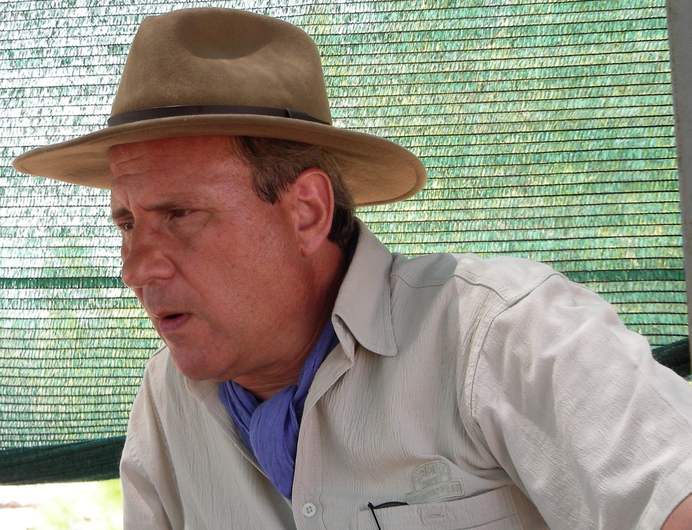 Bülent İplikçioğlu, Rhodiapolis 2009